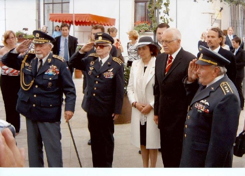 Odhalení busty Beneš. Návštěva prezidenta Václava Klause v Hotelu Růže v Českém Krumlově spojená s aktem položení květin k památníku Edvarda Beneše (červenec 2004).